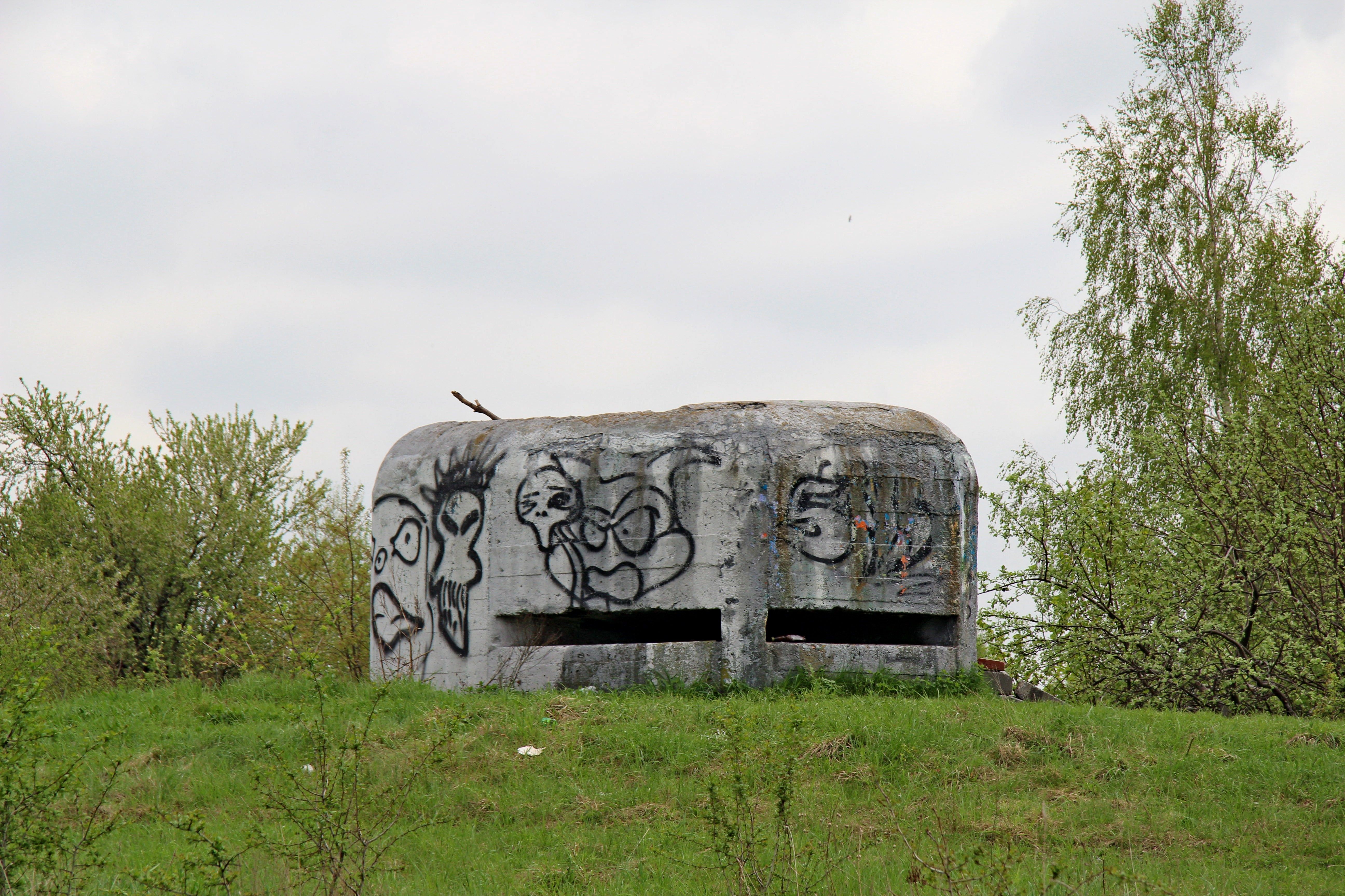 Polski schron bojowy 07 wybudowany w lipcu 1939 roku w ramach częstochowskiej reduty (składającej się z 19 bunkrów, znanych jest 12). Jeden z dwóch schronów obserwacyjnych, powstałych na pozycji częstochowskiej. Są to zarazem jedyne takie obiekty zachowane w pasie działania Armii "Kraków". Obiekt położony na odcinku obrony II batalionu 27 pp. Mieścił się w nim punkt obserwacyjny z którego oficer zwiadowczy ppor. Marian Buchacz kierował ogniem 7 dac. 2 września 1939 roku brał udział w walkach o wzgórze 296,6 w Liszce Górnej. Nosi liczne ślady trafień, otrzymał m.in. trafienie pociskiem 150 mm, jednak nie został naruszony. W rejonie schronu zachowały się fragmenty okopów i rowów łącznikowych oraz leje po bombach i ostrzale artylerii.